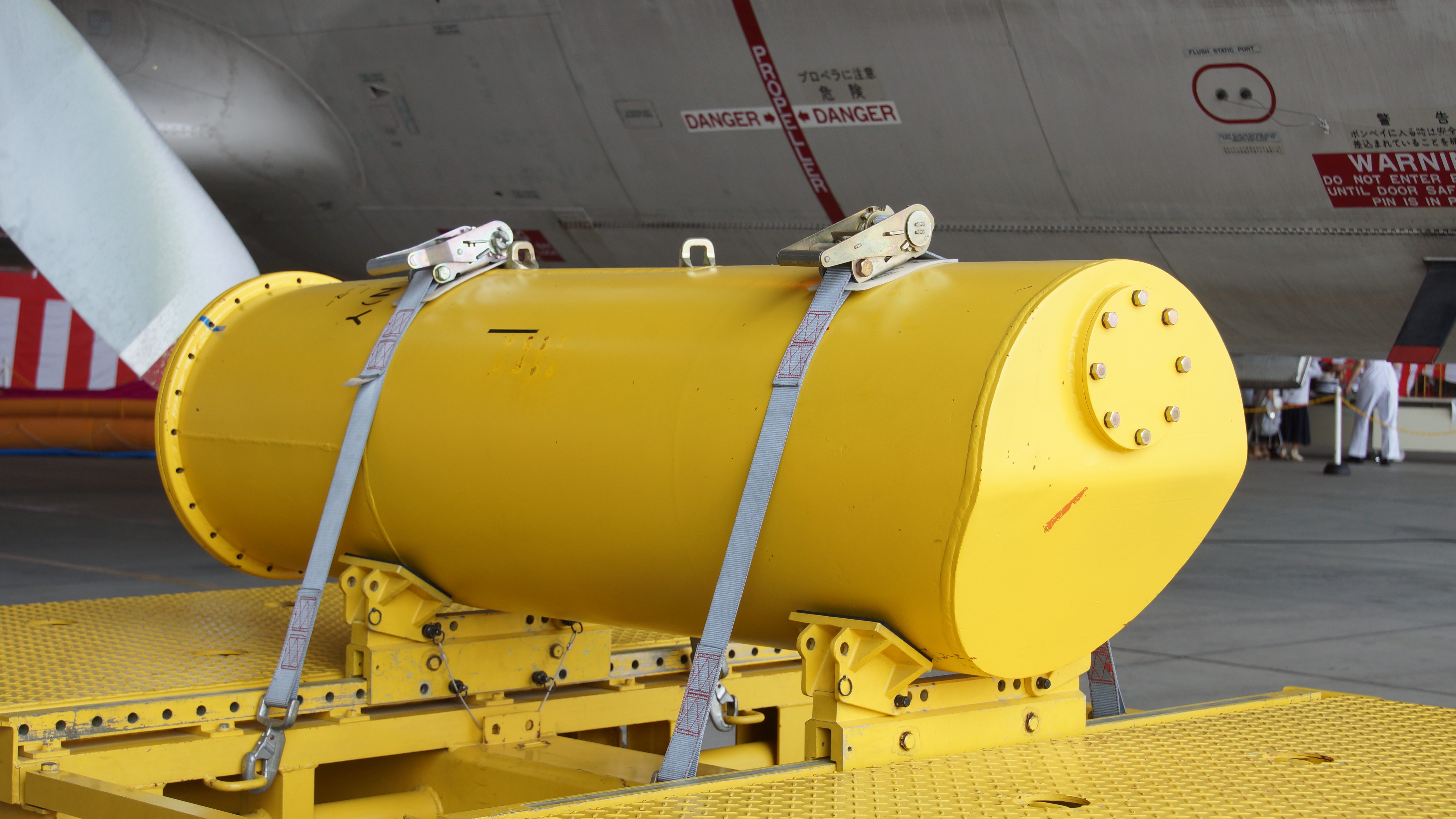 海上自衛隊 Mk52機雷 右前面。2017年4月30日 鹿屋航空基地にて。